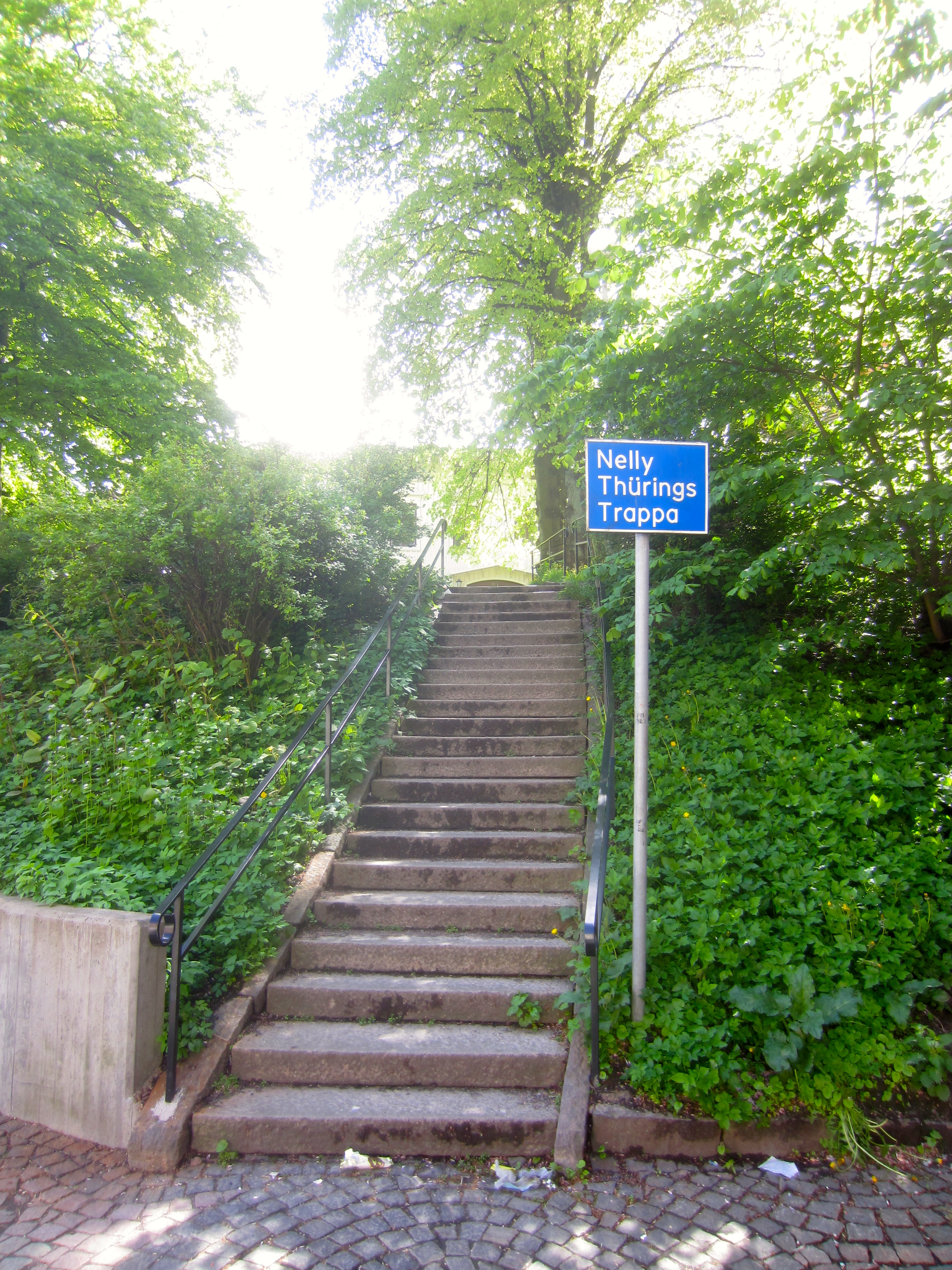 Nelly Türings Trappa, Lorensberg i Göteborg.